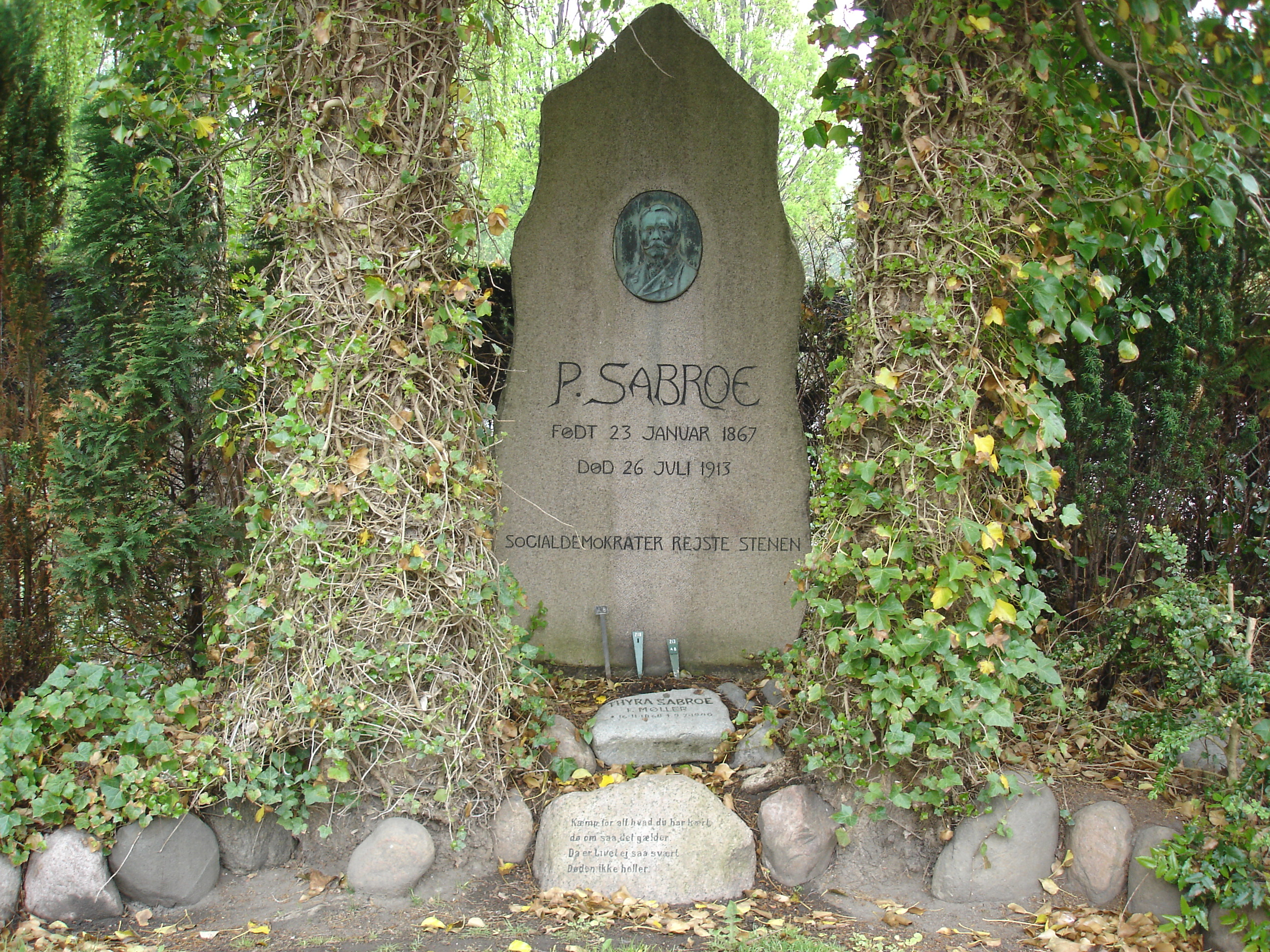 Politikeren, redaktør Peter Sabroes gravsten på litra D på Nordre Kirkegård i Aarhus med portrætmedaljon, udført af Elias Ølsgaard